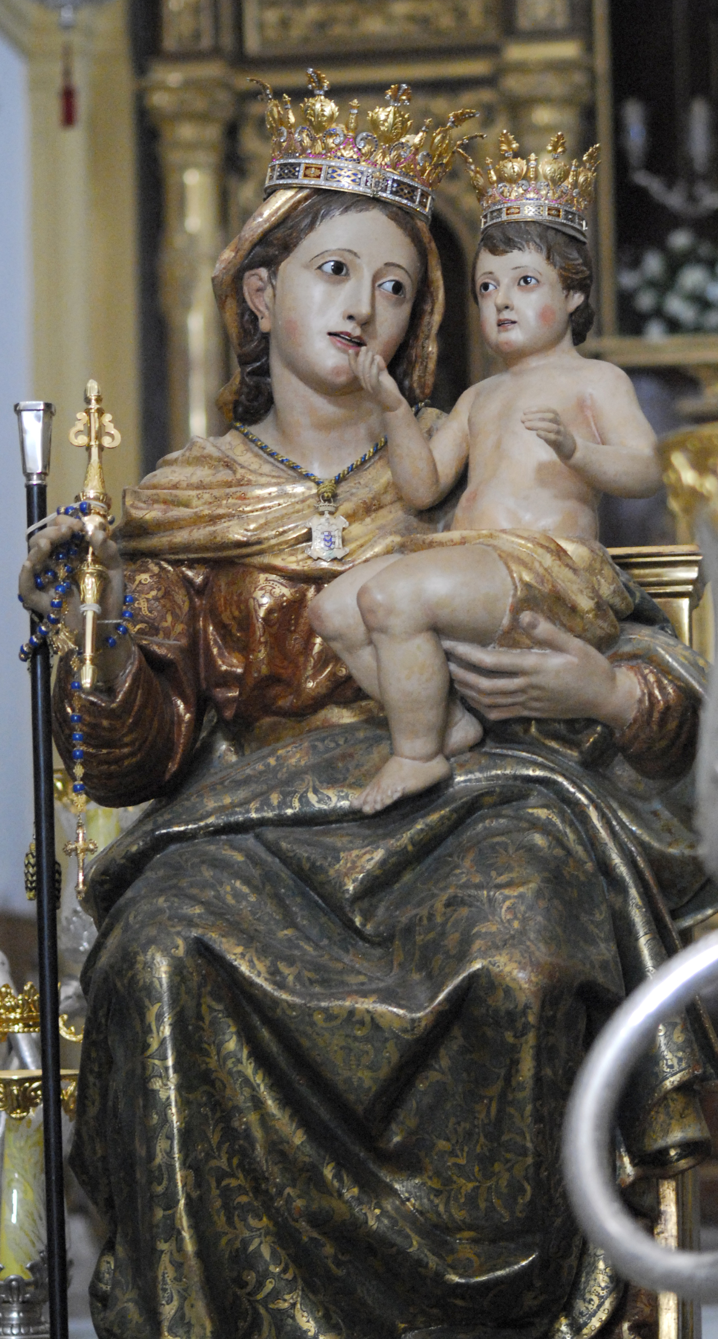 Patrona de Melilla